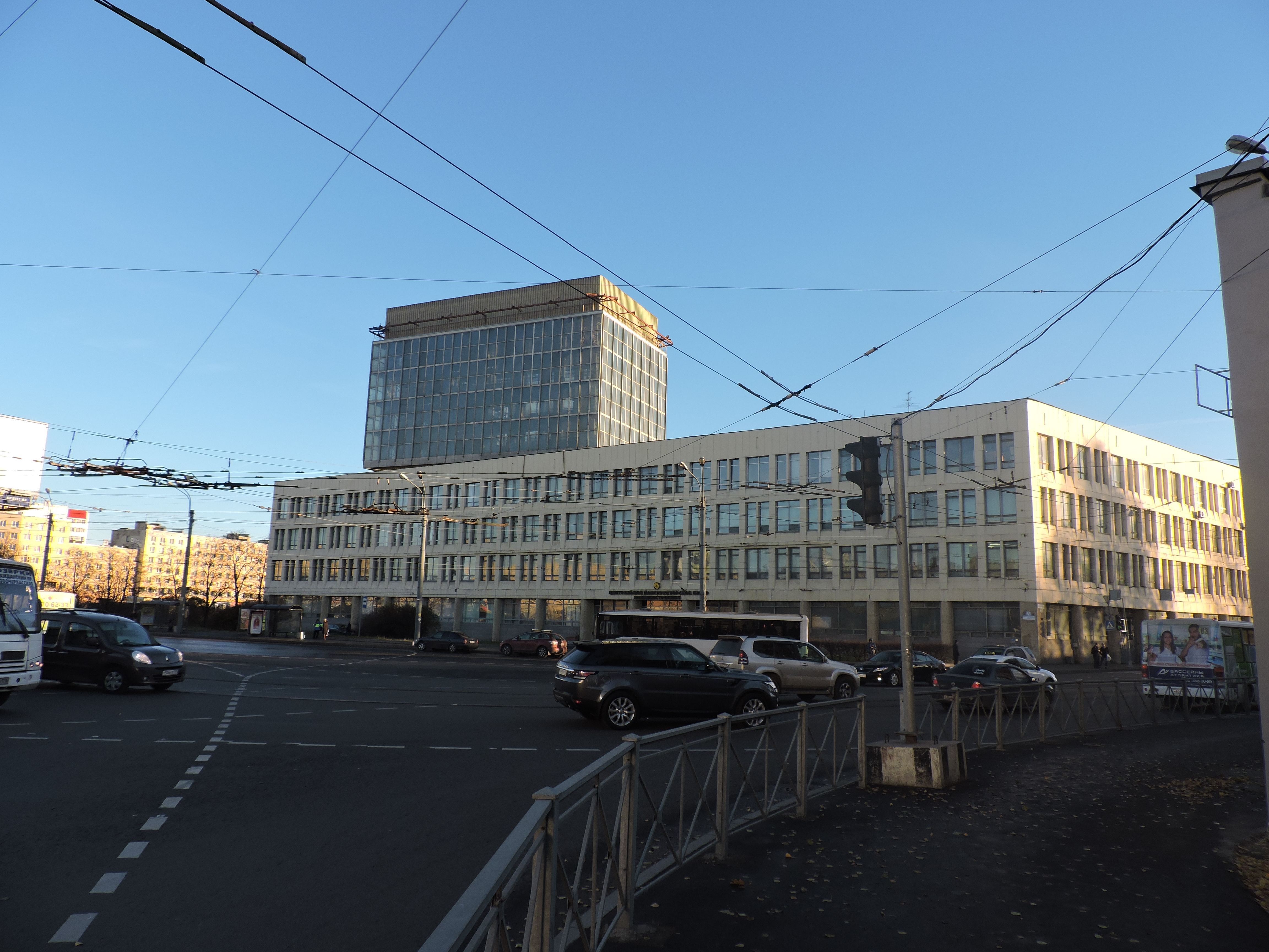 ЦКБМ на Красногвардейской площади